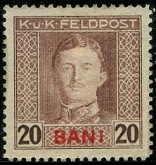 Почтовая марка полевой почты Австро-Венгрии для оккупированной части Румынии